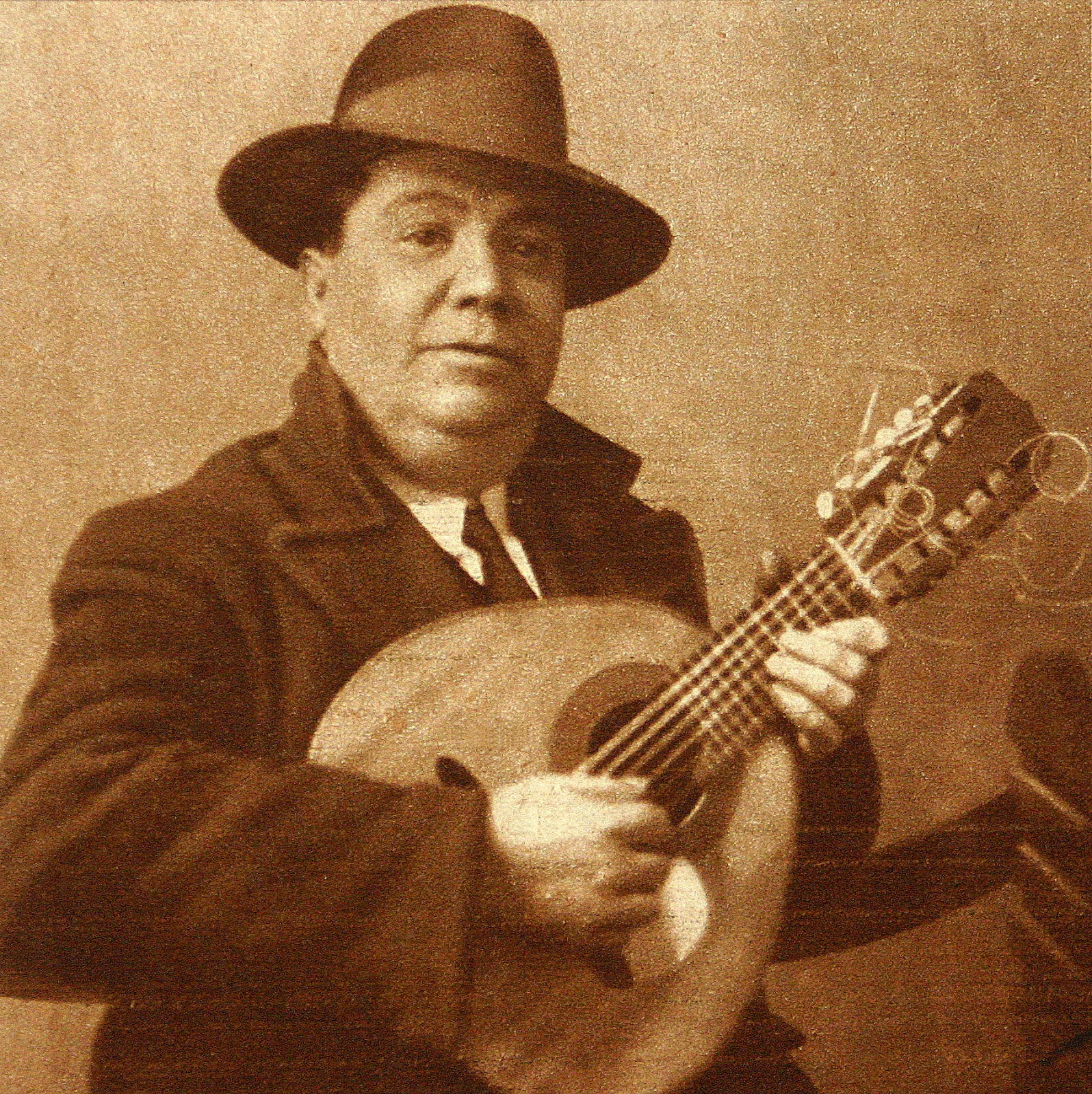 Manuel López Cañamaque años 30